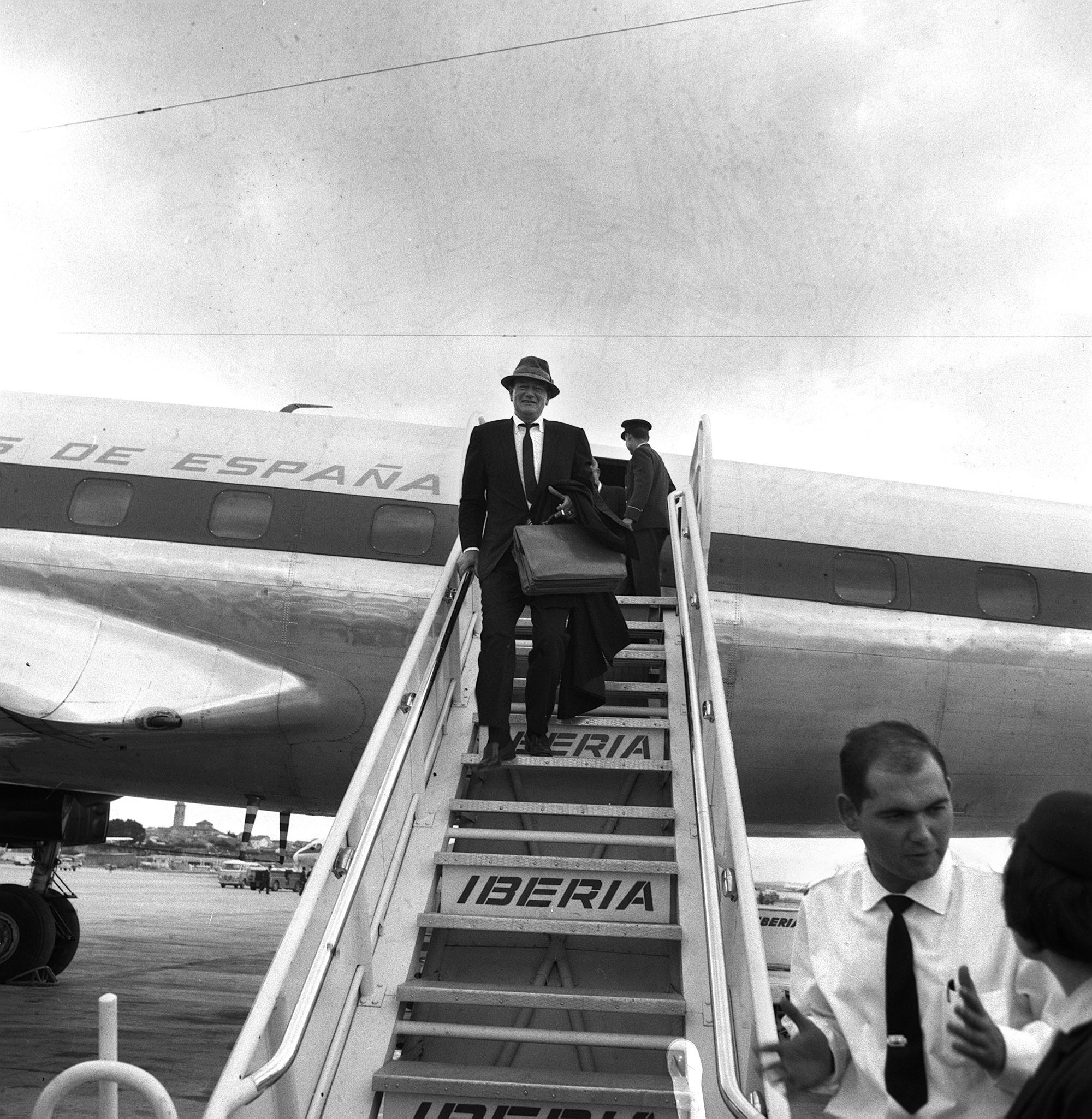 El actor John Wayne llegando a Mallorca.